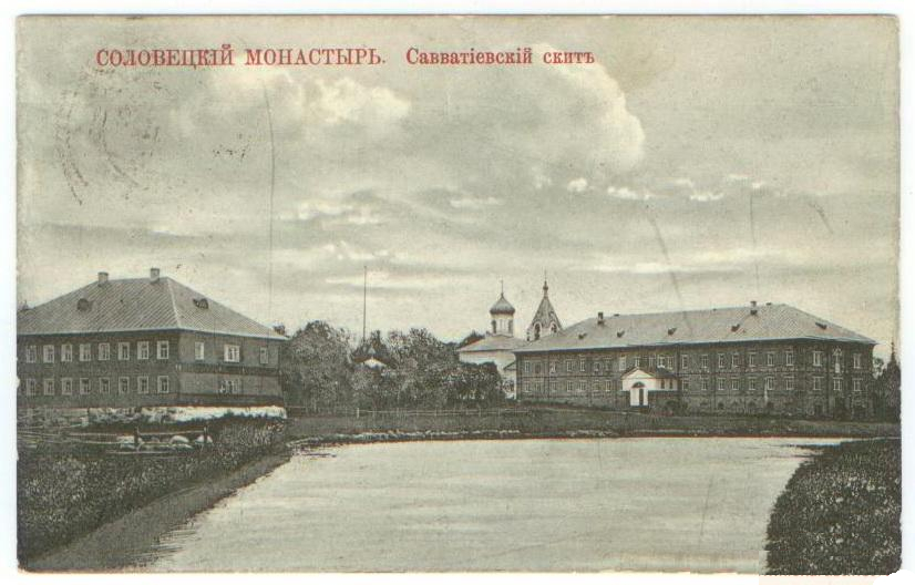 №35, Соловецкий монастырь. Савватиевский скит. Изд. Булычева А.П.